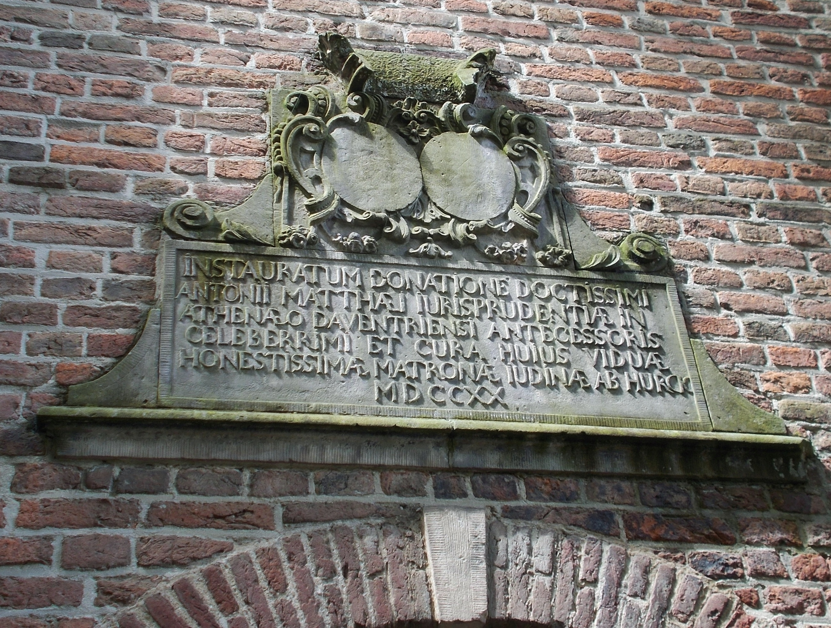 Gedenksteen boven een ingang van het voormalige kloosterkerkje (later dorpskerk) te Diepenveen. De gevelsteen memoreert de renovatie van het ruineuze gebouw in 1720. Die mogelijk was geworden dankzij een legaat van Antonius Matthaeus (IV), professor aan het Athenaeum Illustre in het nabije Deventer